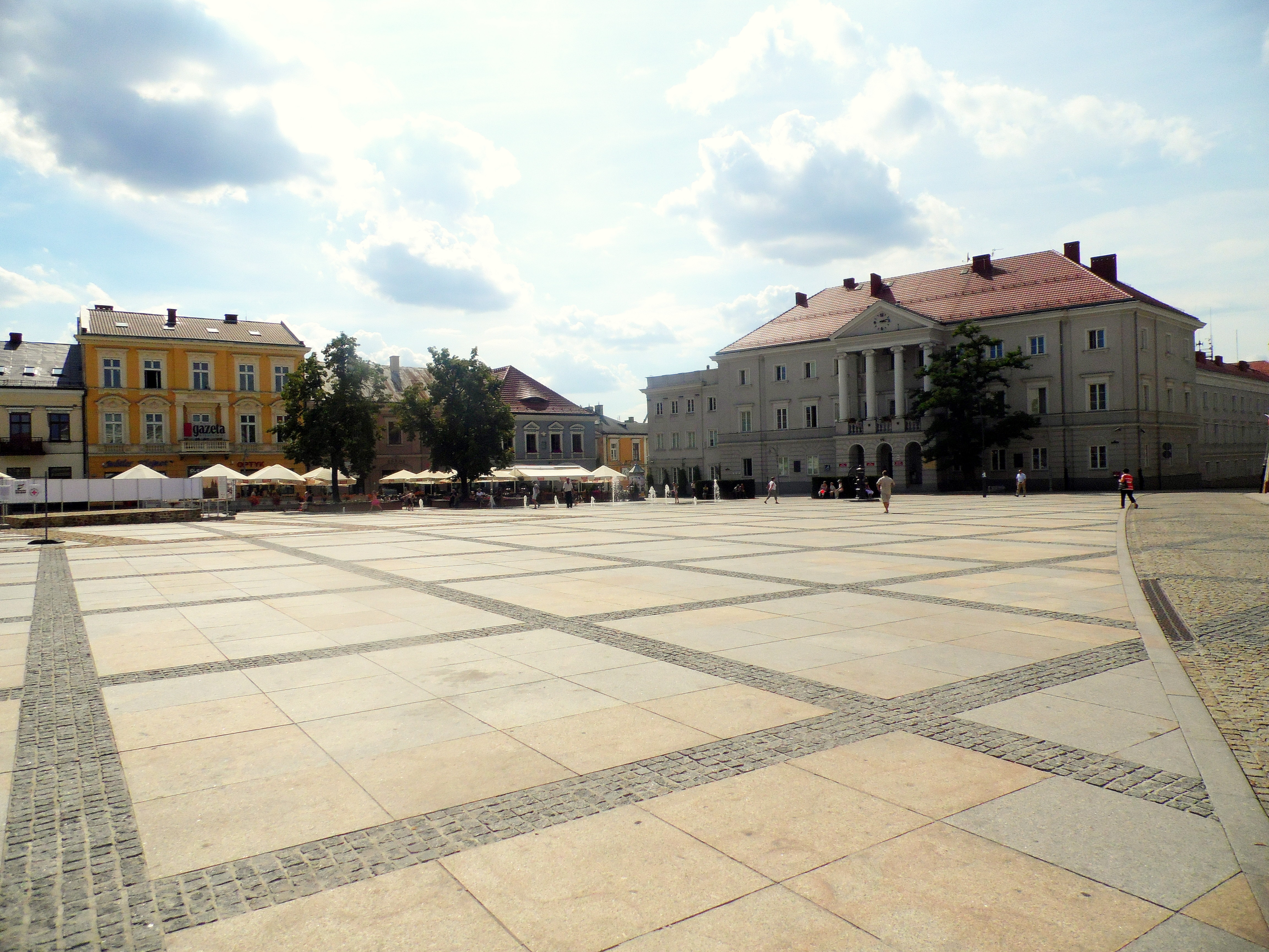 Kielce, Rynek z wylotami ulic: Piotrkowska, Kozia, Warszawska, Bodzentyńska, Mała i Leśna, XIV, XX w.